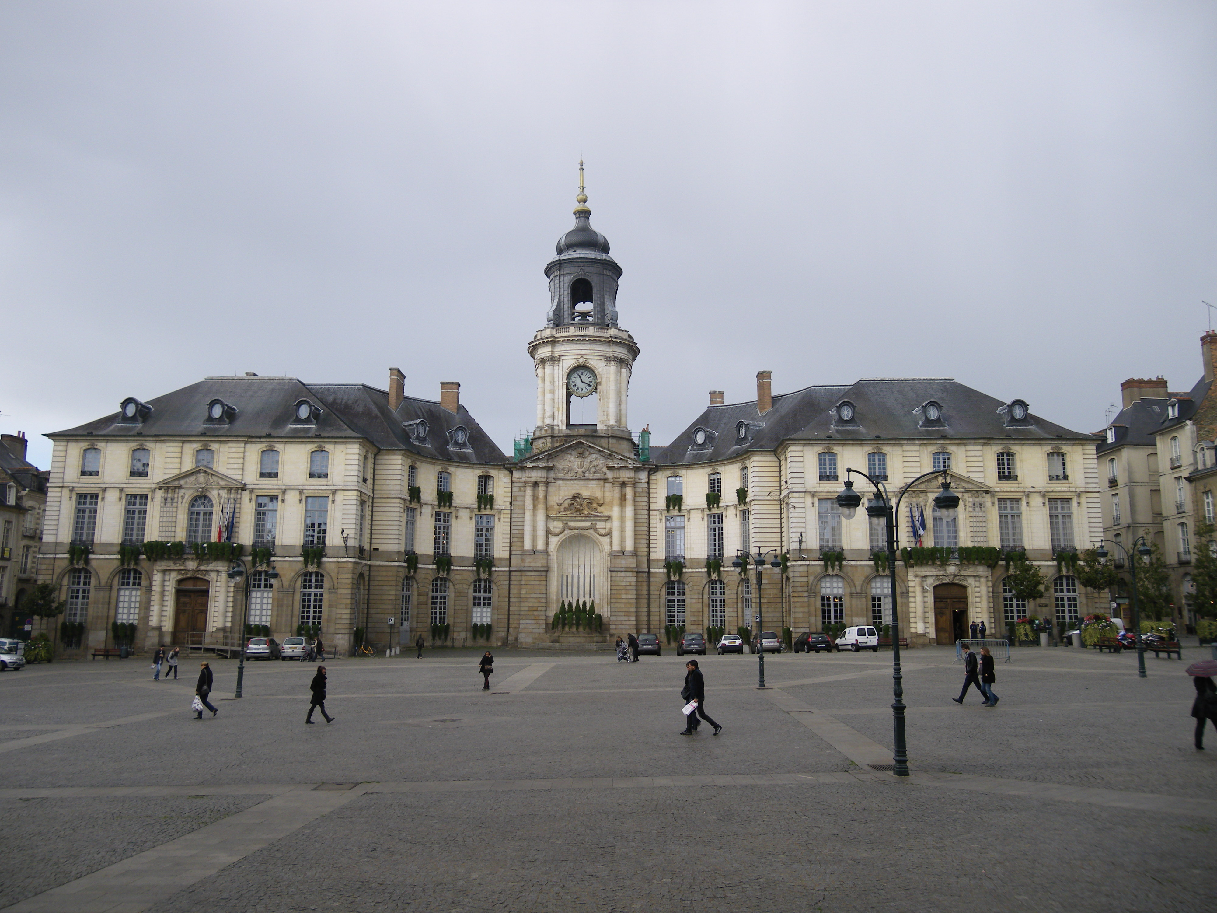 la mairie de rennes octobre 2010